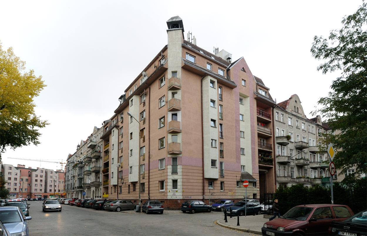 Zgodna 15 (róg ulicy Zgodnej i placu Zgody).